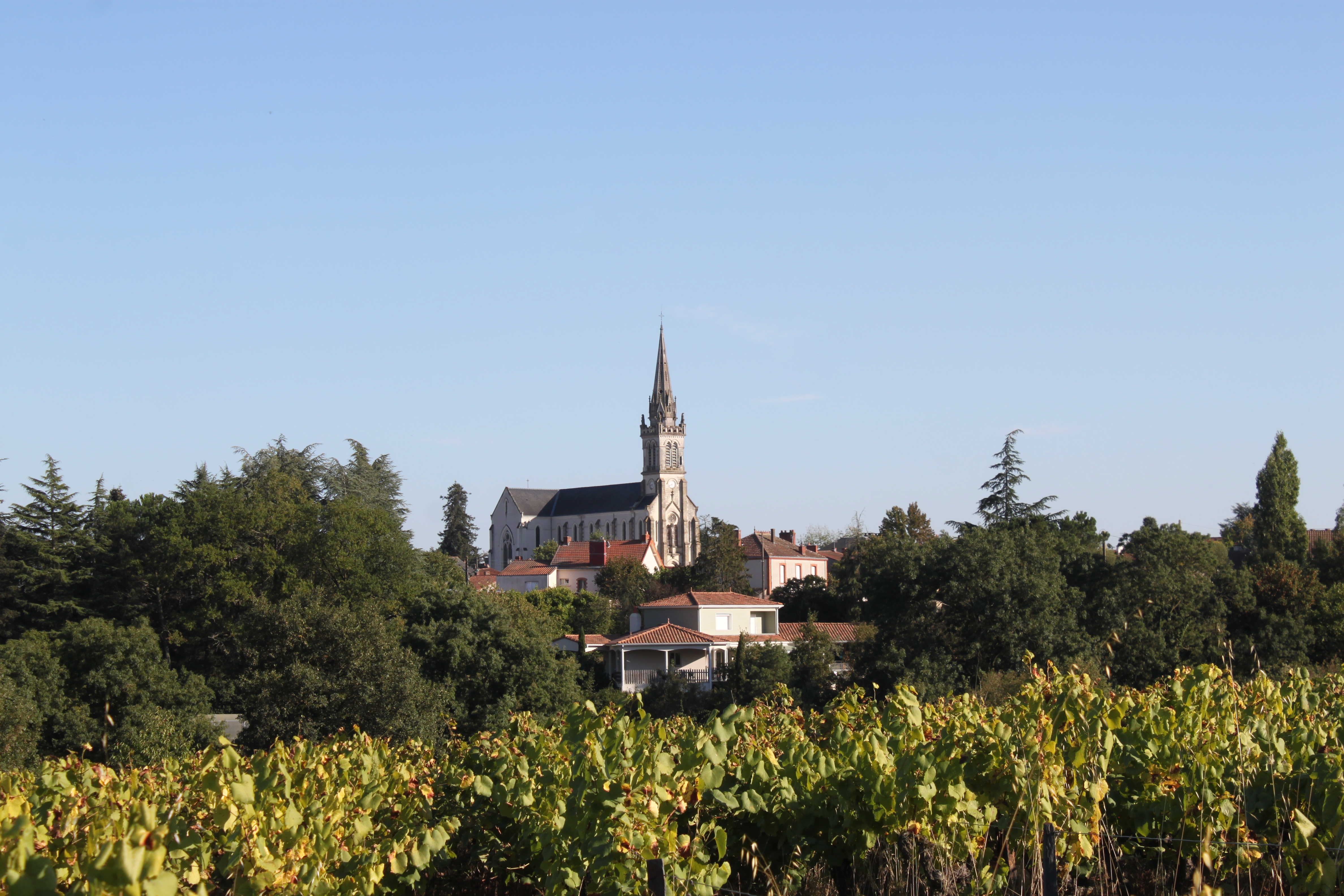 Église Saint-Martin, Fr-44-Gorges.